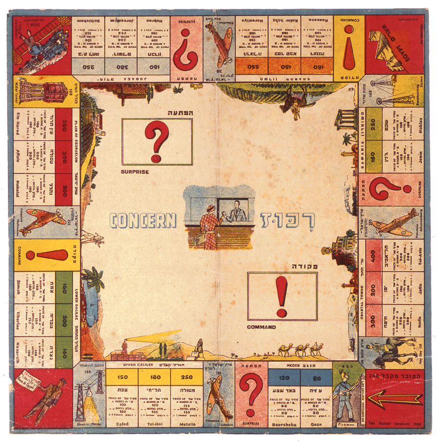 ריכוז, 1940 לוח משחק